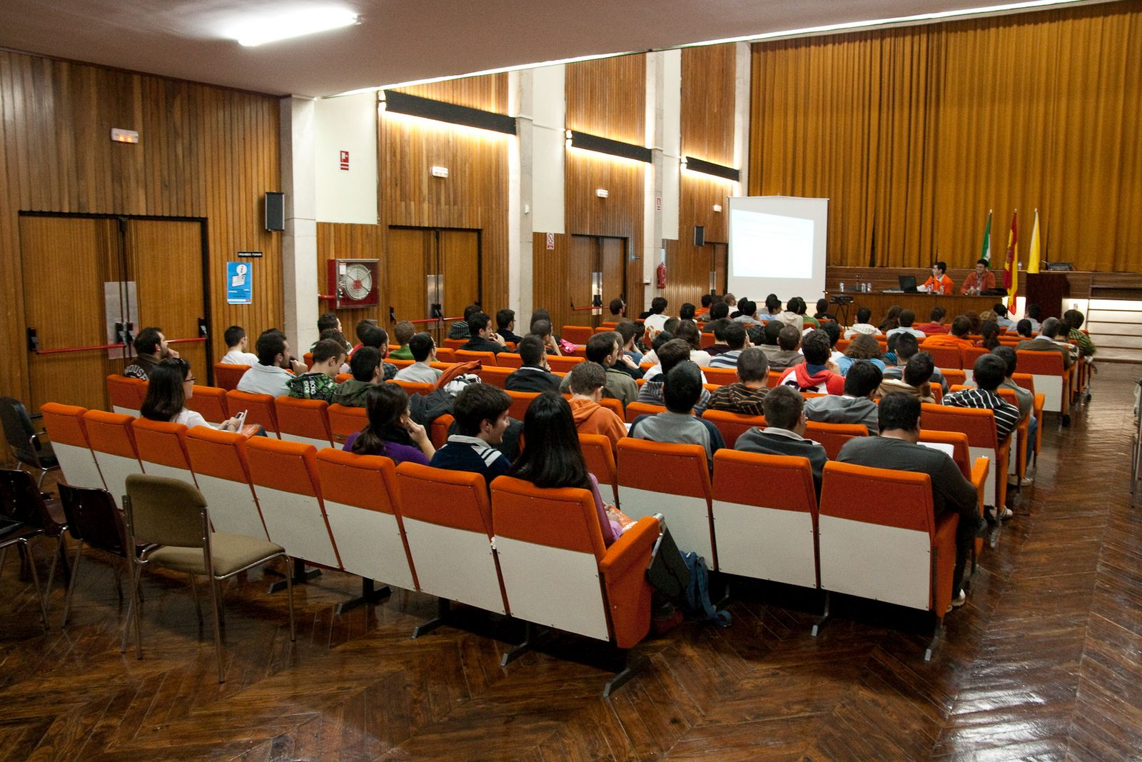 JOSLUCA IV - 2009: Público en las ponencias de las IV Jornadas de Software Libre de la Universidad de Cádiz.